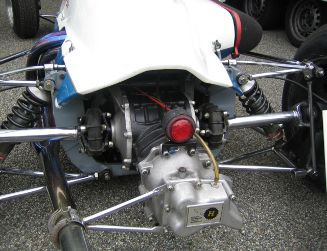 Lotus 32 Formula 2 1500cc, Pau GP 2007